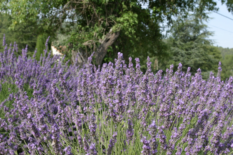 Lavender